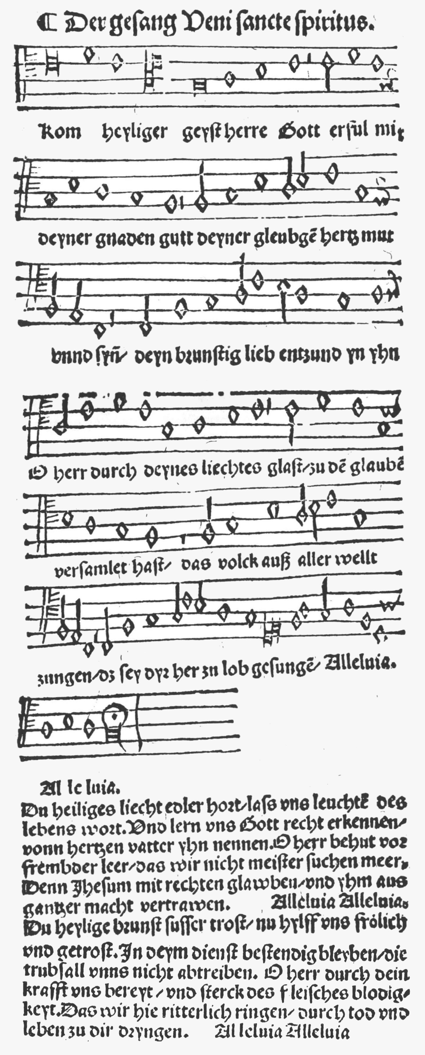 Erstdruck des Liedes Komm, Heiliger Geist, Herre Gott, Enchiridion geistlicher Gesänge, Erfurt 1524